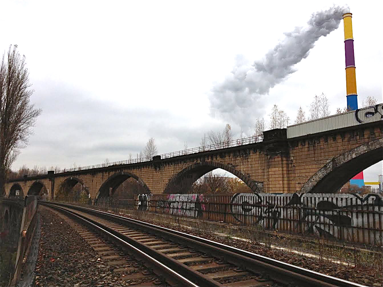 Bauwerke Sachsens, Chemnitztalviadukt, Denkmalschutz, Bogenbrücke, Benita Martin, Malerin, Fotografin